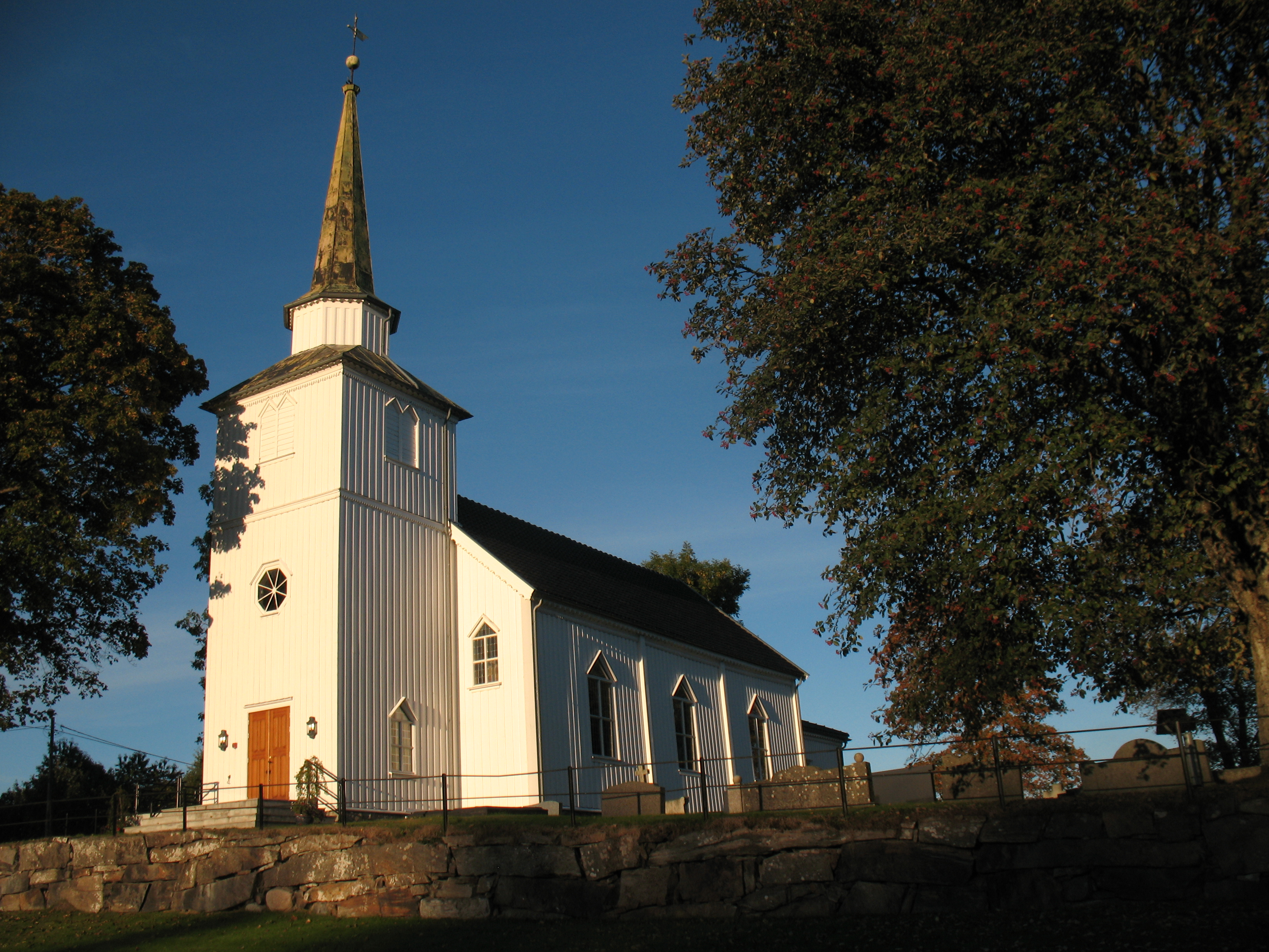 Kirken sett fra sørvest